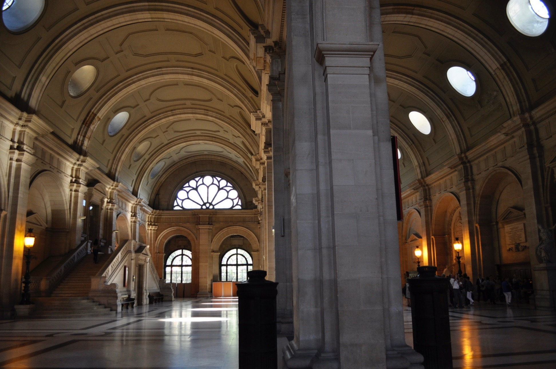 Les deux nefs de la salle des pas perdus du Palais de justice de Paris les deux nefs vues vers l'est .